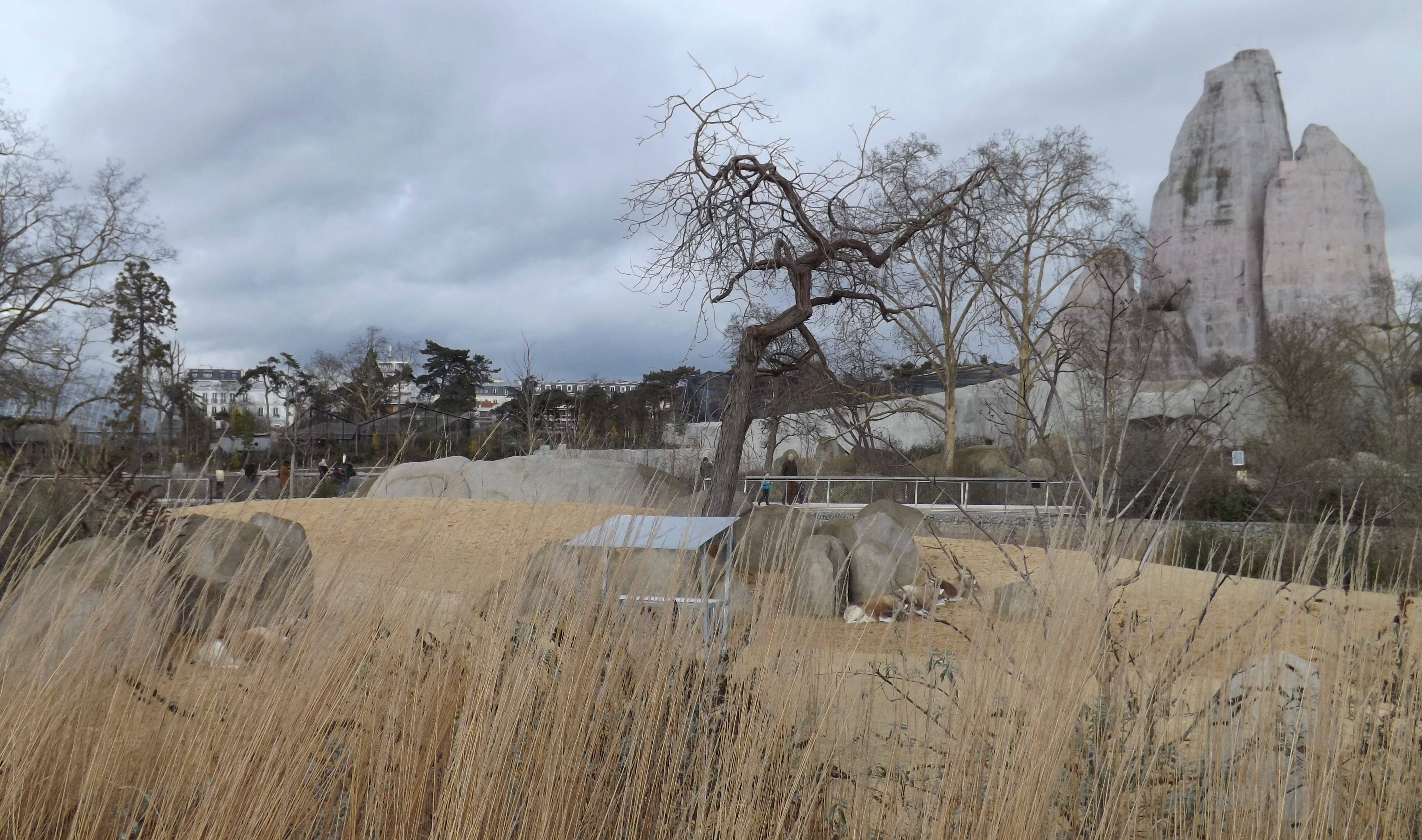 Parc zoologique de Paris, Biozone Sahel-Soudan, addax (Addax nasomaculatus)